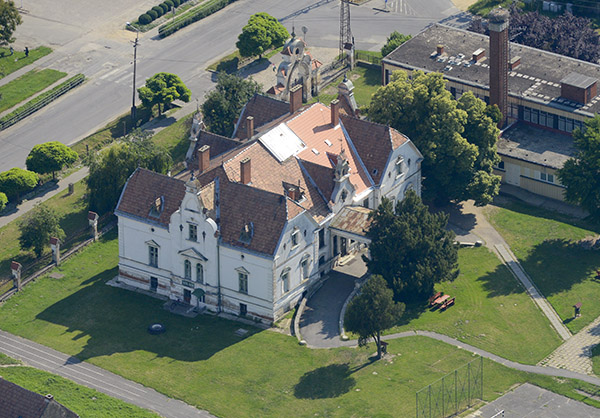 A Barthodeiszky-kastély légi felvételen, Beled